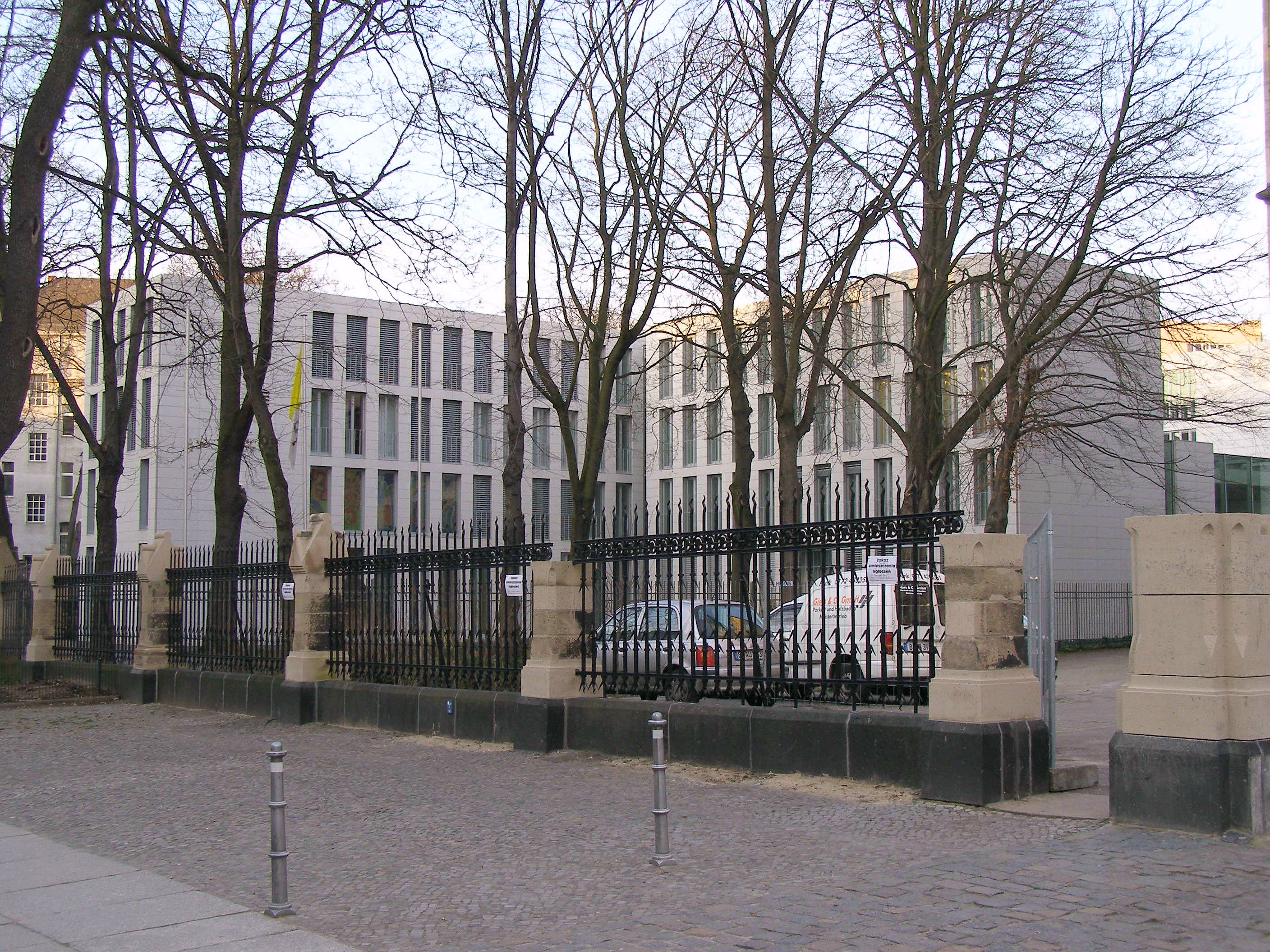 Nuntiatur Berlin (Kreuzberg, Lilienthalstraße)